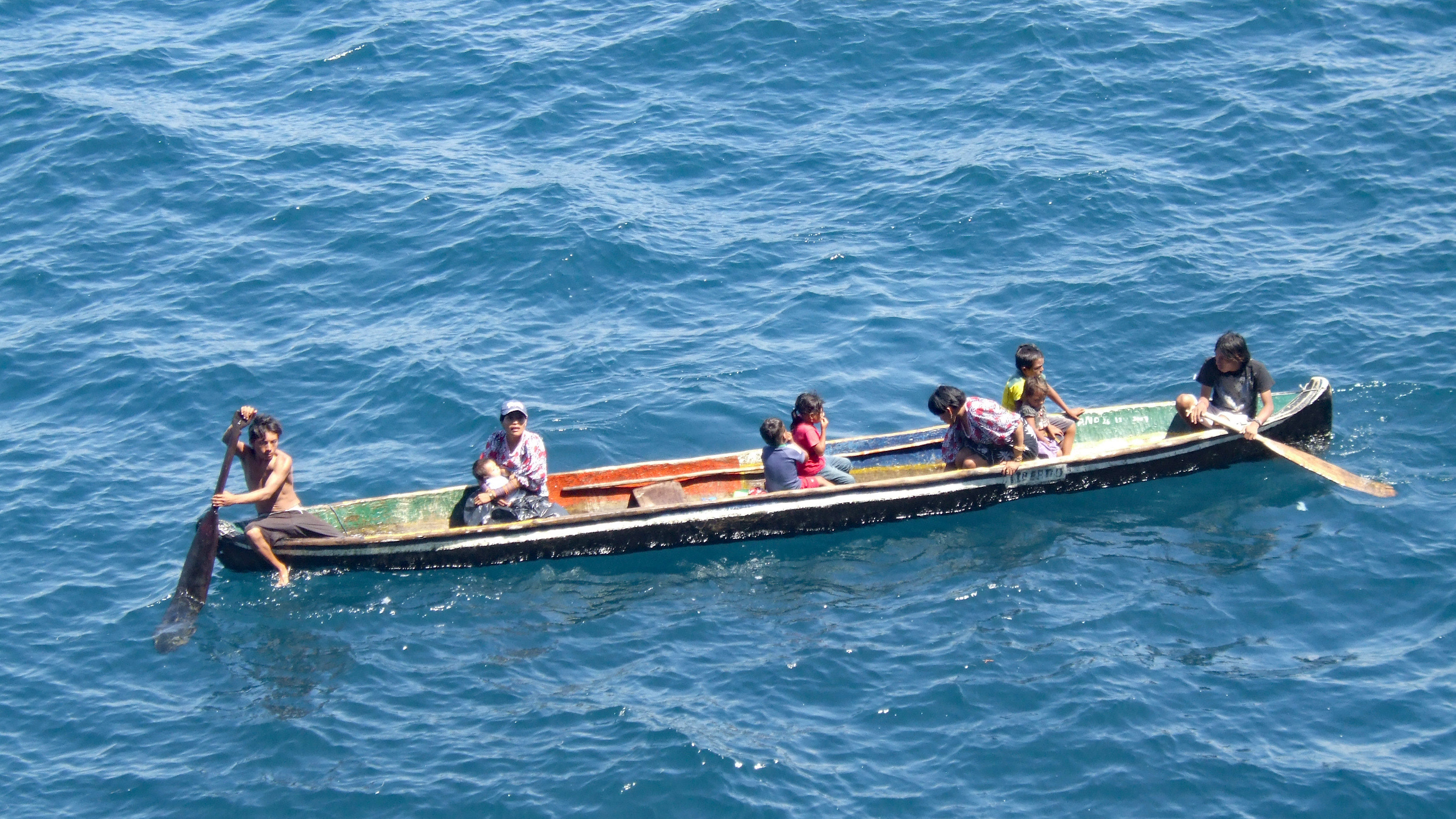 Guna, Kuna, canot, bateau, indigène, panama, San Blas